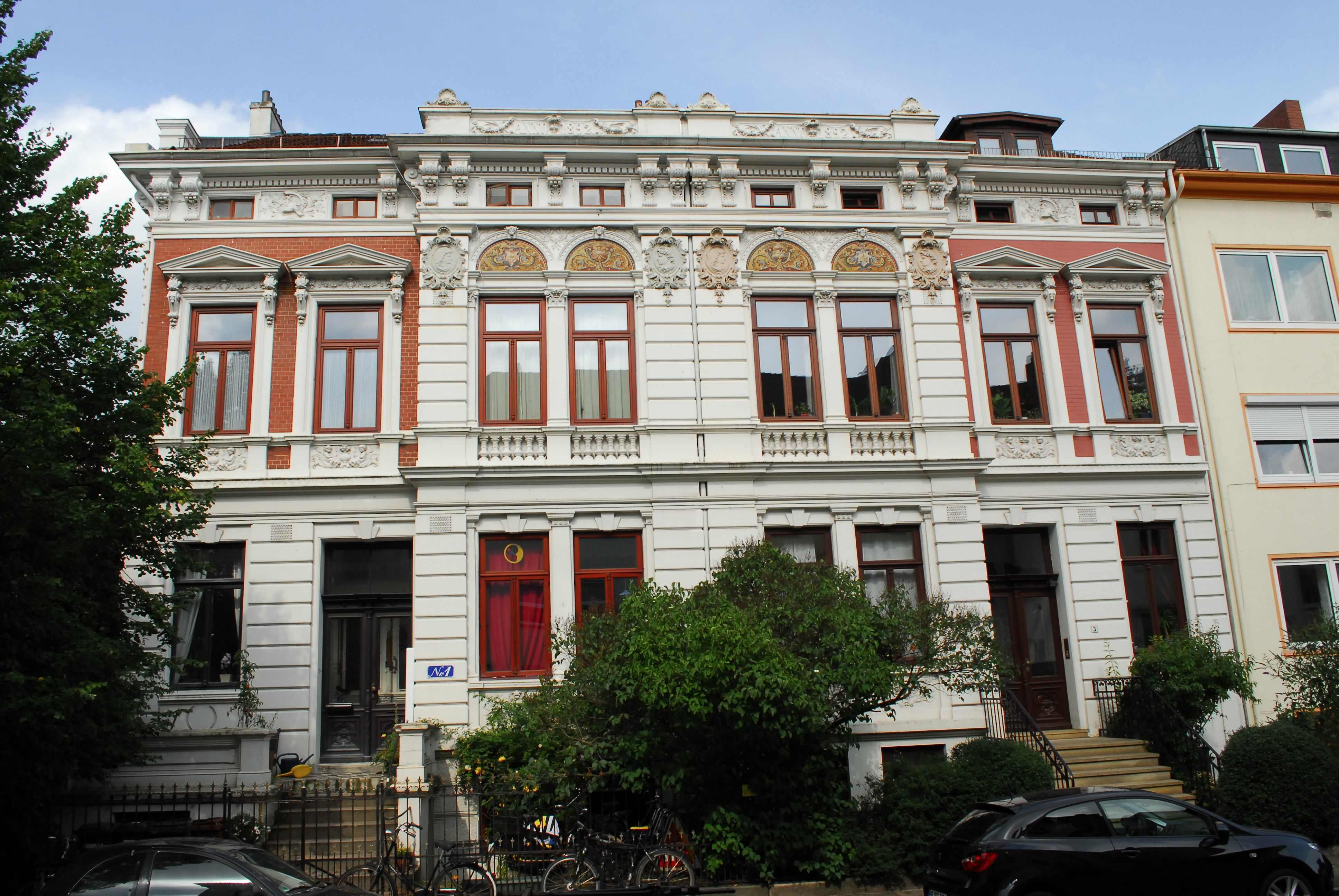 Wohnhausgruppe in Bremen, Roonstraße 1, 3.Die Denkmalgruppe ist ein geschütztes Kulturdenkmal in der Freien Hansestadt Bremen, mit der Nr. 1438 beim Landesamt für Denkmalpflege registriert.